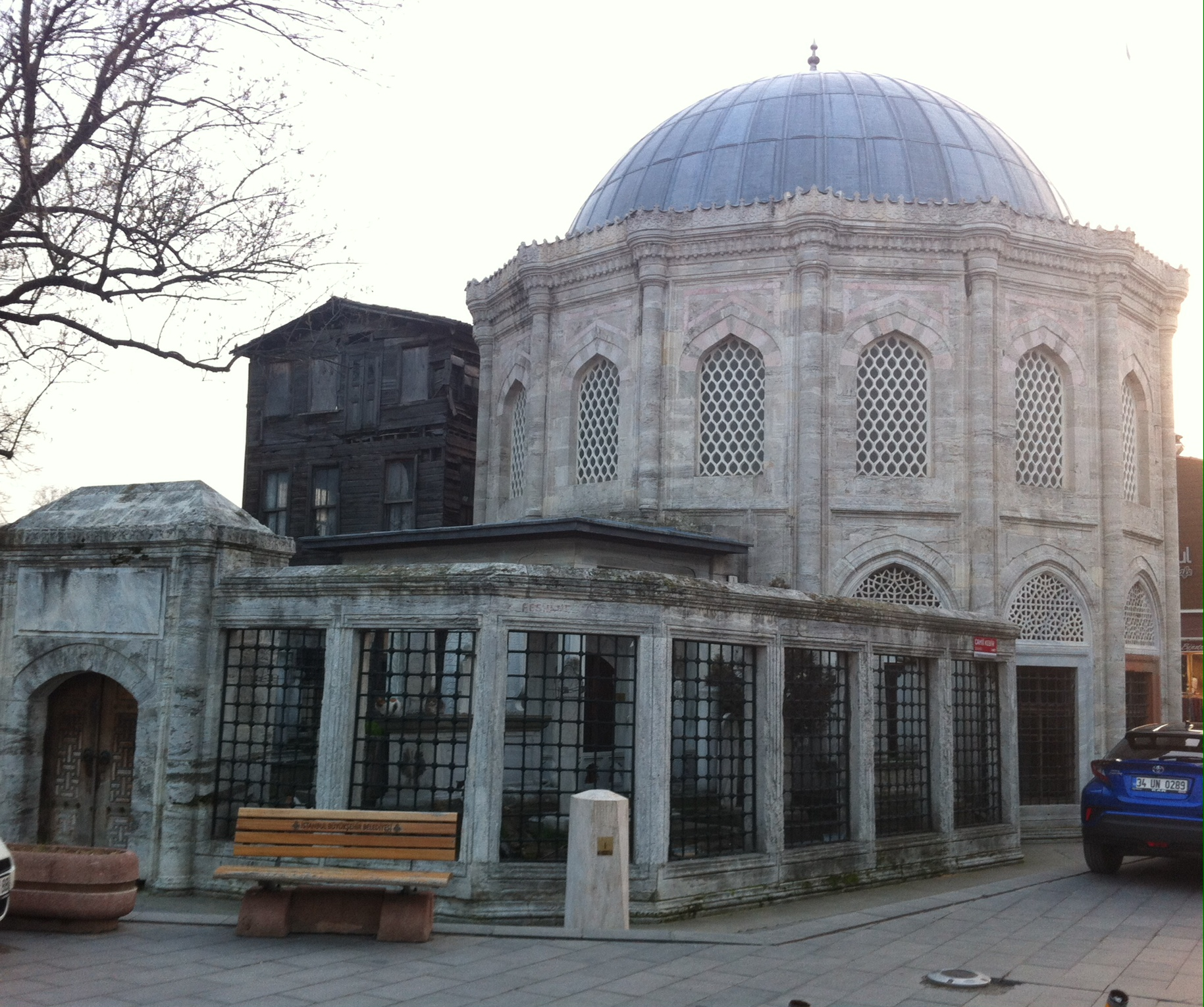 Serdar Ferhad Paşa Türbesi -Eyüp